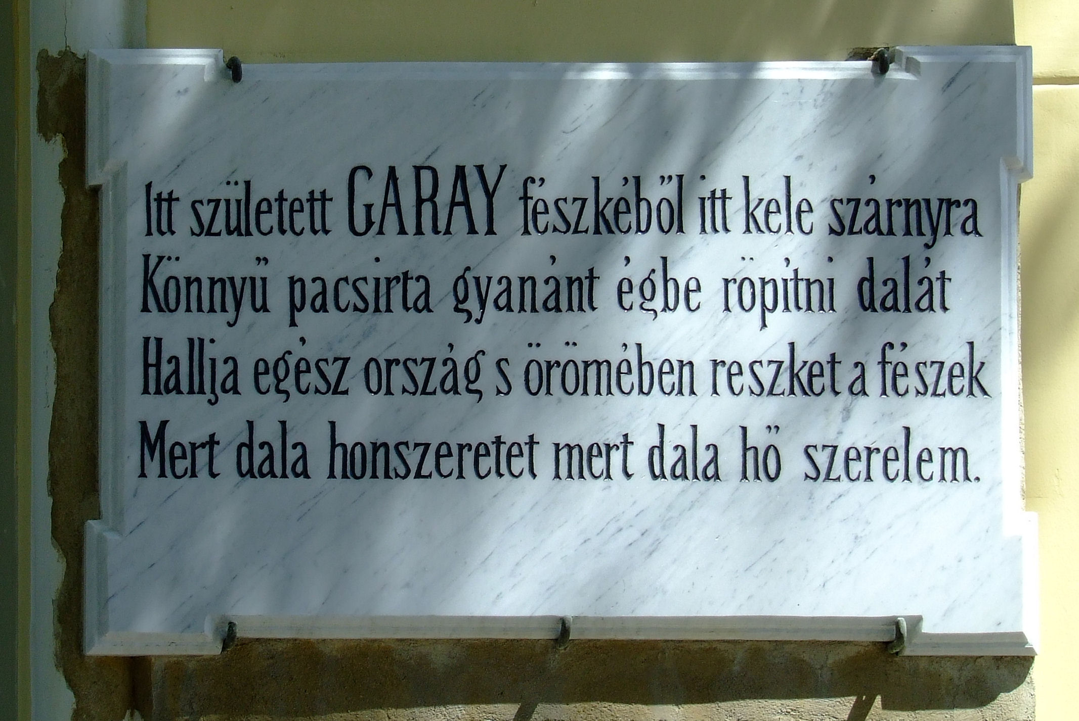 Emléktábla Szekszárdon Garay János szülőházának helyén álló épület falán (Garay tér). Várady Antal disztichonja. A táblát 1881-ben helyezték el.